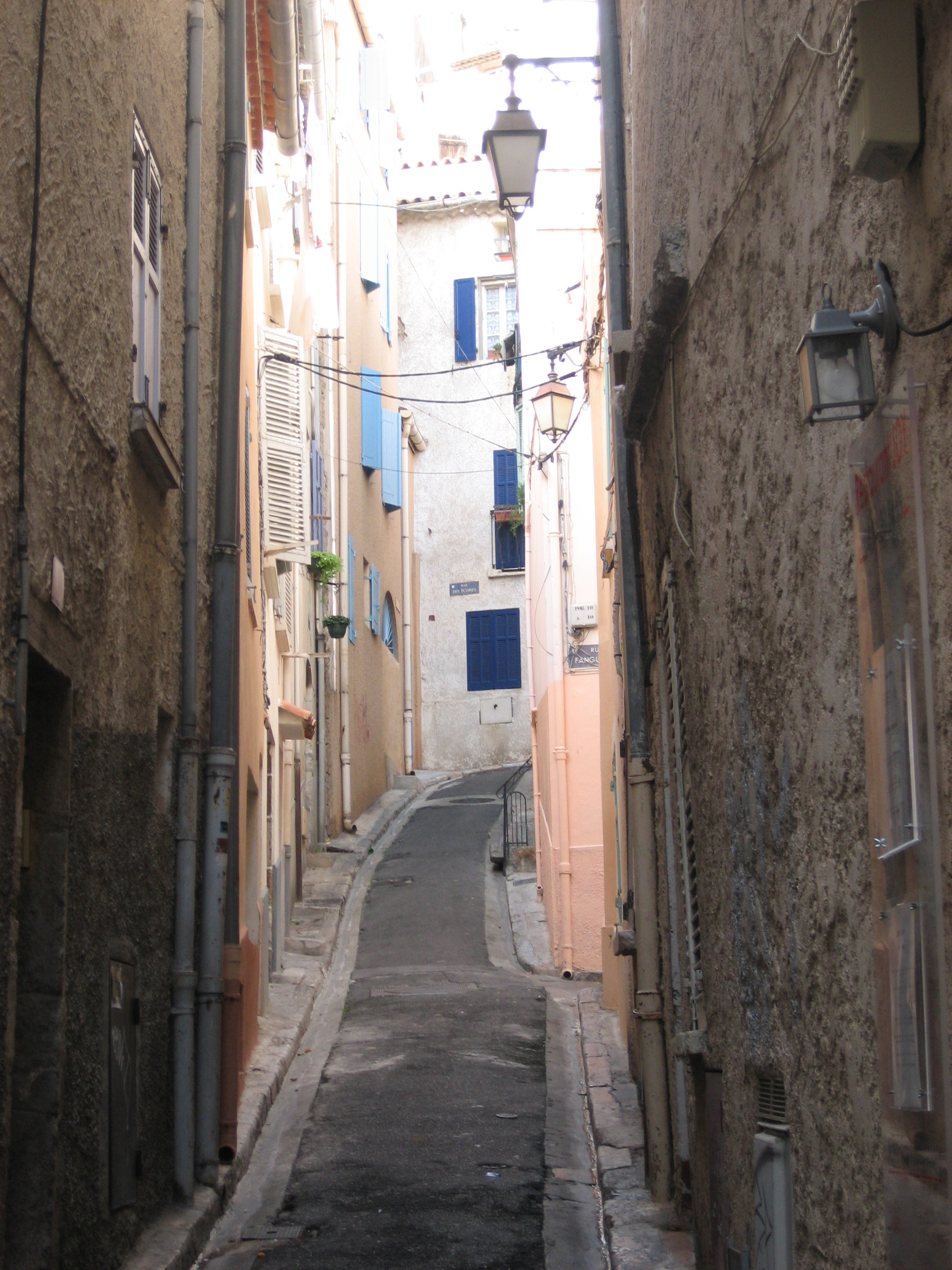 Hyères